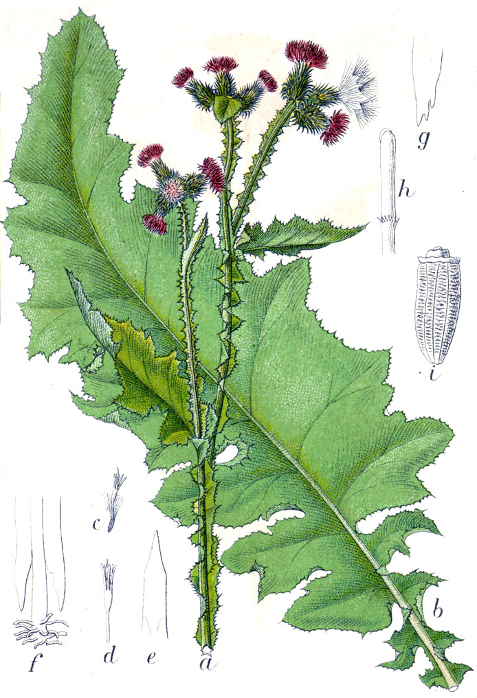 Carduus crispus L. Original Caption Krause Distel, Carduus crispus